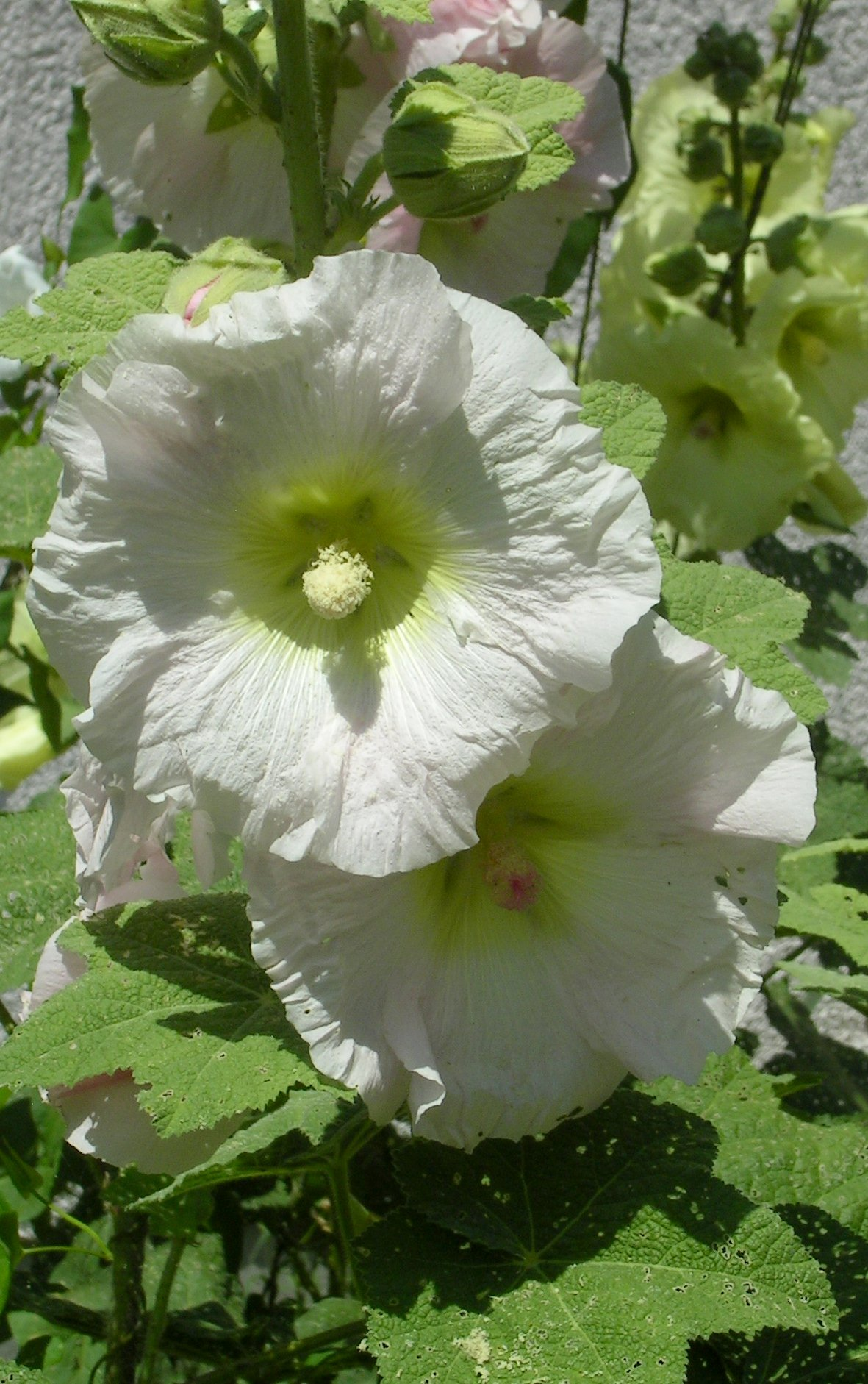 (en) Alcea rosea Place: Switzerland, SG, Garden Editing: cut (GIMP) (de) Stockrose (Alcea rosea) mit weissen Blüten Aufnahmeort: Schweiz, SG (im Garten) Bearbeitung: GIMP Zugeschnitten